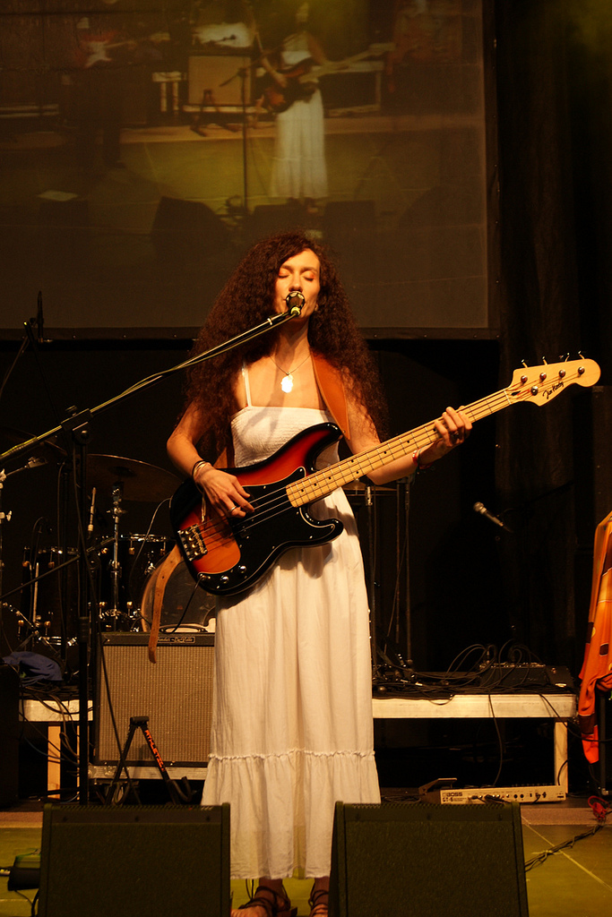 XIX Olsztyńskie Noce Bluesowe - dzień pierwszy